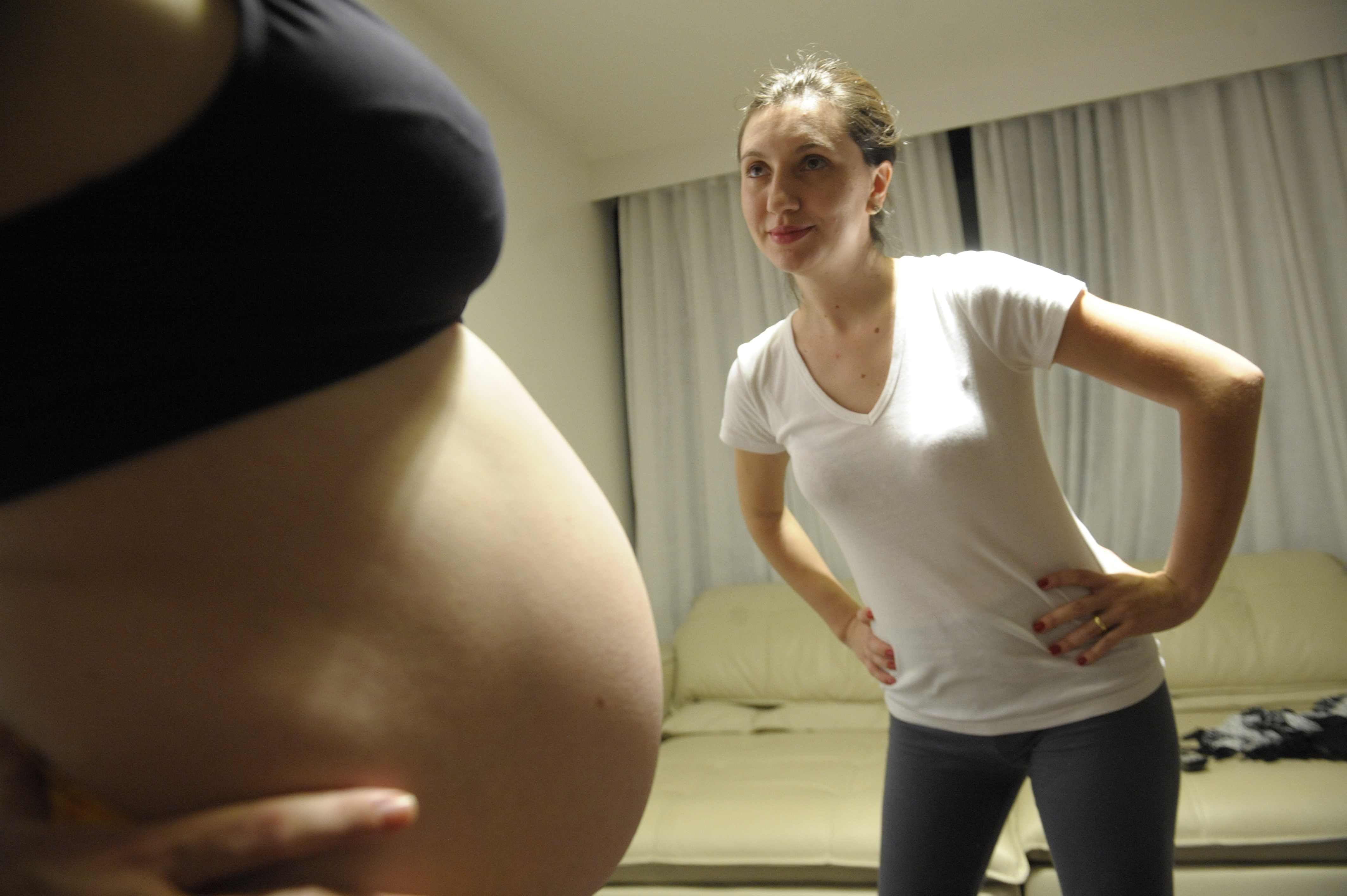 Doulas oferecem orientação, suporte físico e emocional à família na gravidez e no parto. A doula Jéssica Macêdo orienta Luciana Rodovalho sobre posições, exercícios e cuidados que ajudam a gestante a se sentir mais confortável no final da gravidez e aliviam as dores no trabalho de parto, como banho, posição de "cavalinho" e apoio de bola. Foto: Jefferson Rudy/Agência Senado